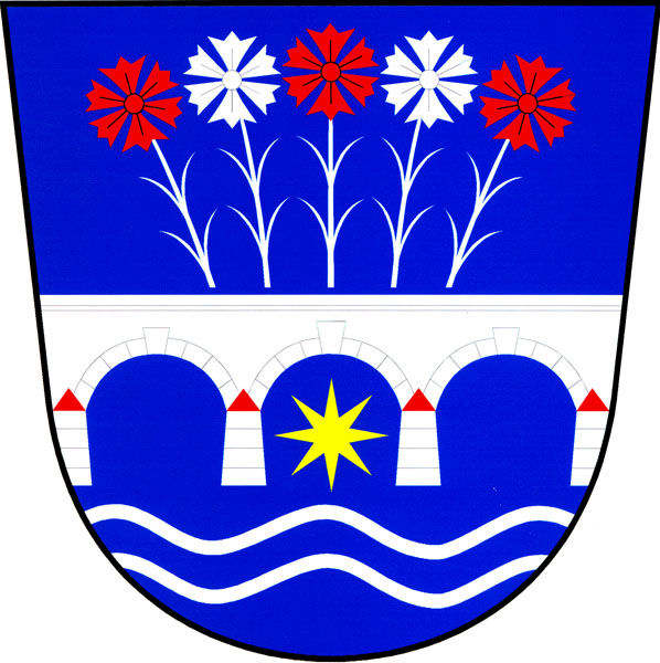 Znak obce Toušice